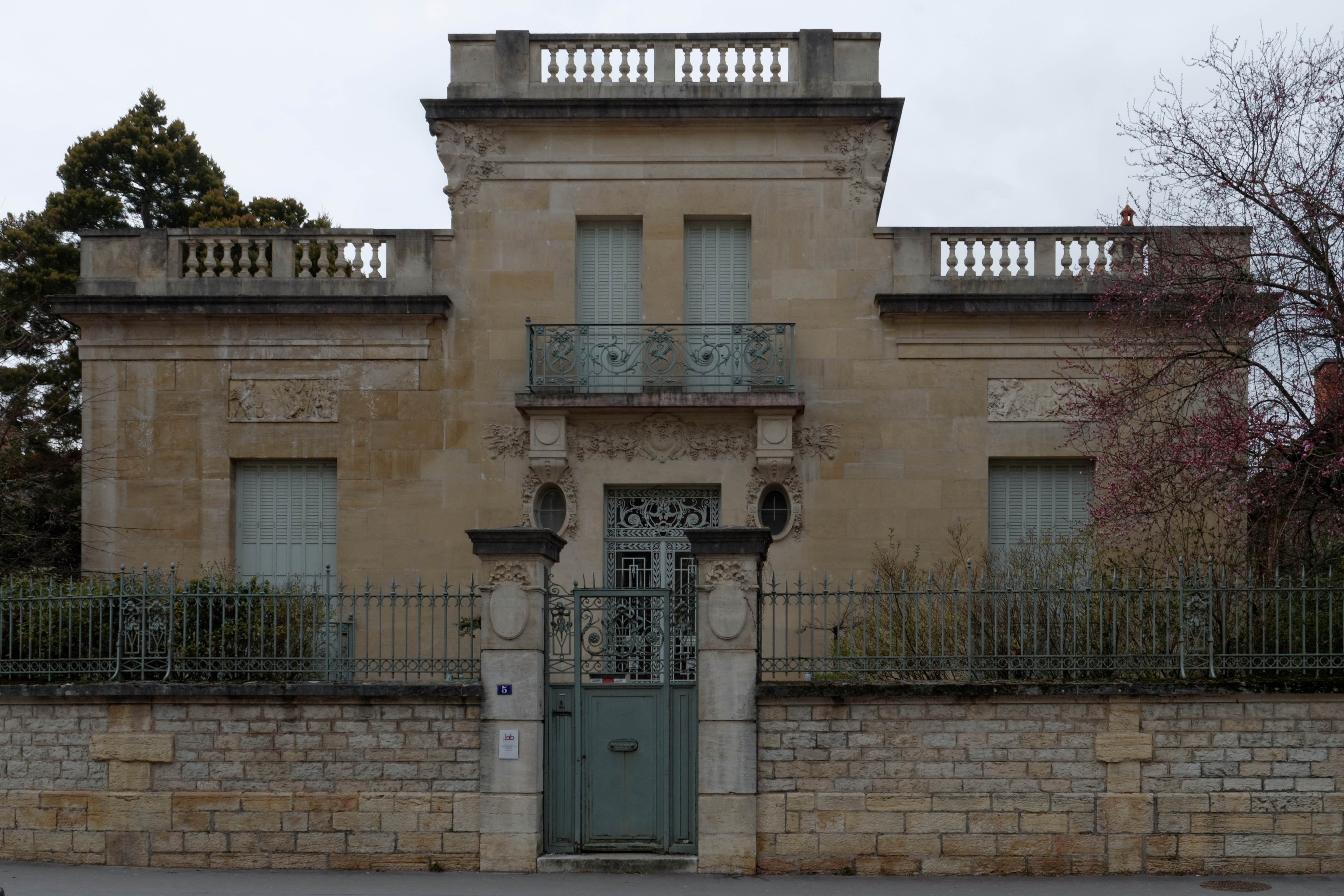 Photo de la façade de la villa Messner, 3 - 5 rue Parmentier (Inscrit, 1983)